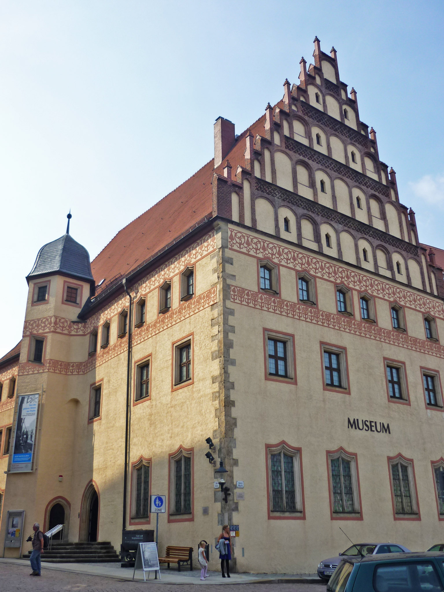 Museum - Am Dom 1 in der Altstadt von Freiberg (Sachsen)